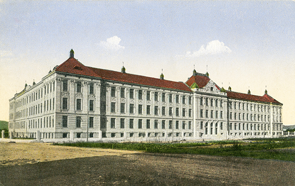 Cesarsko kraljeva Državna obrtna šola v Ljubljani. Razglednica, odposlana leta 1918 (založil Iv. Bonač, Ljubljana)